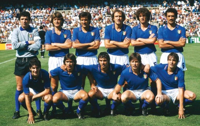 Selecionado italiano que jugó contra Argentina en España 1982. Los jugadores son Zoff, Antognoni, Scirea, Graziani, Collovati y Gentile; Rossi, Conti, Cabrini, Oriali y Tardelli.